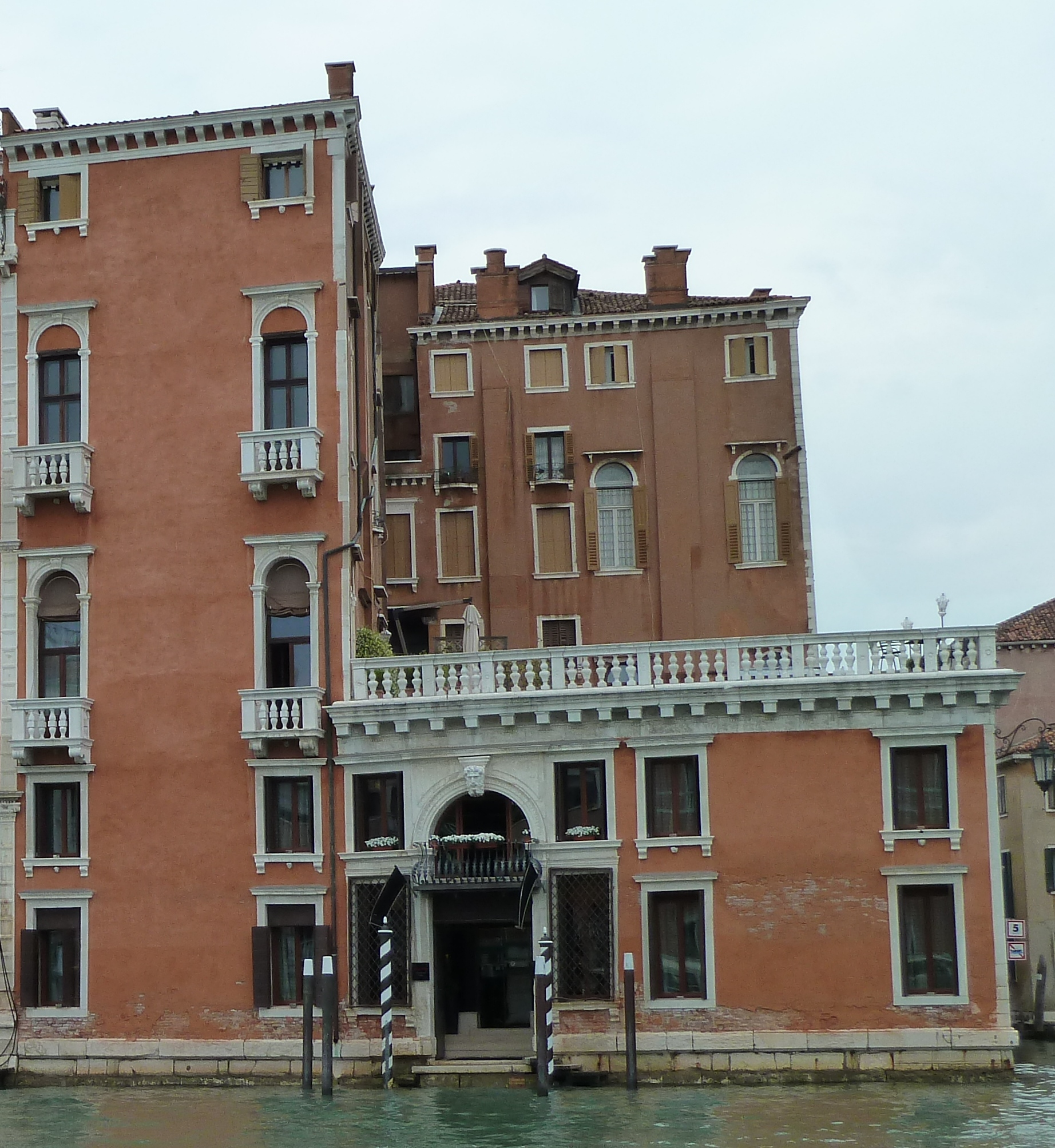 Barbarigo Terrazza